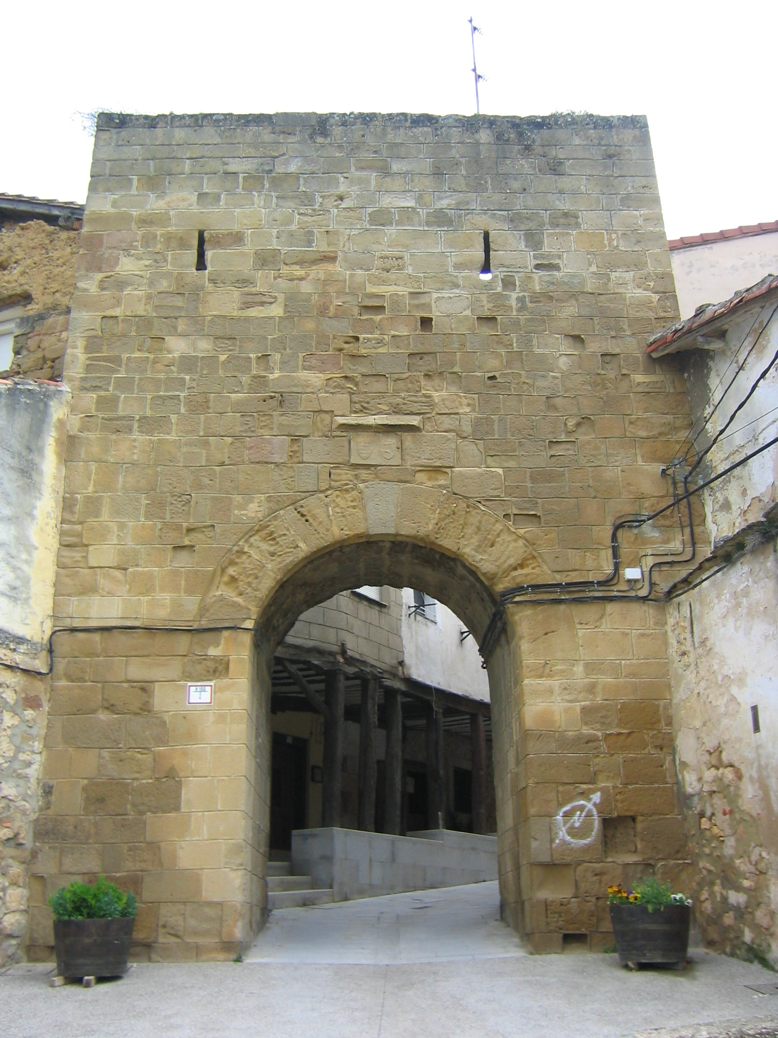 Puerta de Abajo de las murallas de Salinillas de Buradón, en el municipio de Labastida (Álava, España).